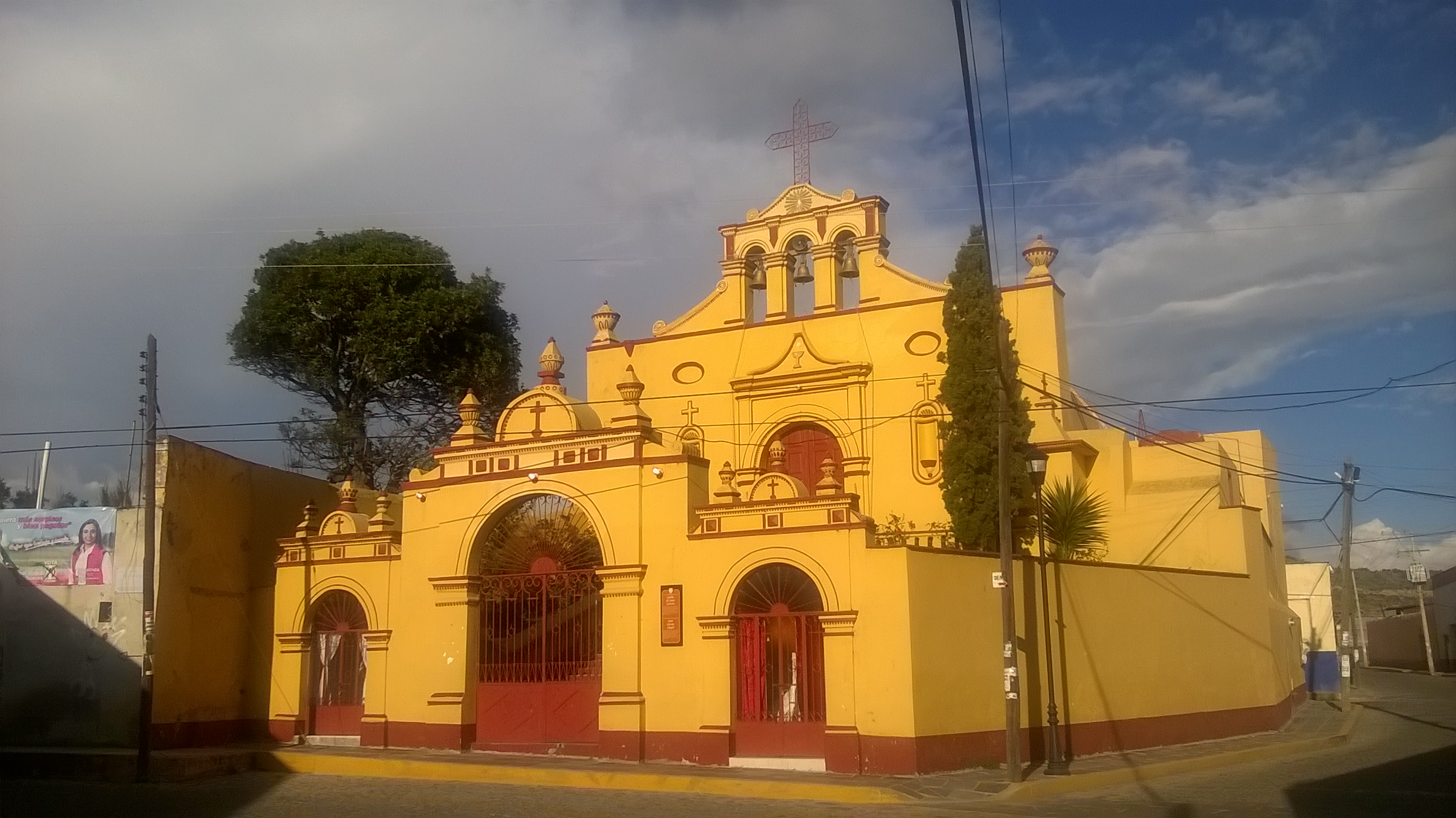 Capilla del Calvario, Tlaxco, Tlaxcala